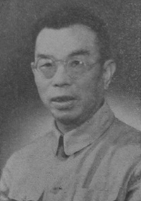 中國人民政治協商會議第一屆全體會議代表